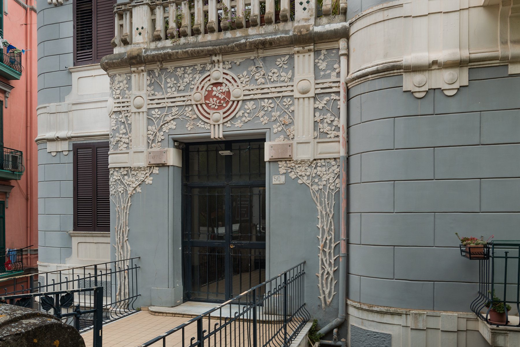 Dettaglio delle decorazioni floreali poste all'ingresso della palazzina.